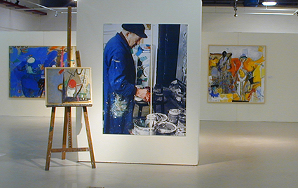 משה רוזנטליס: התערוכה במוזיאון הפתוח בתפן, 2004